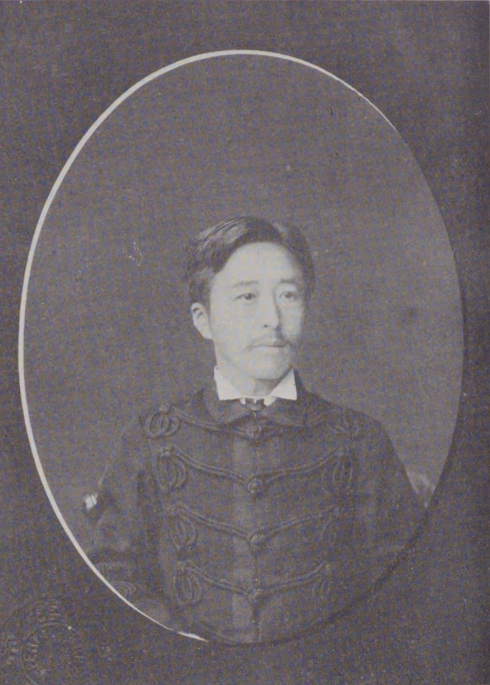 陸軍大尉時代の小鷹狩元凱